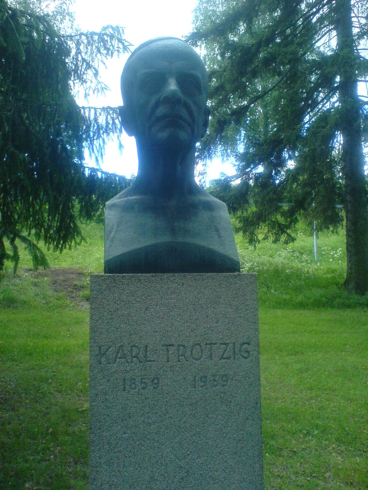 Bust of Karl Trotzig, Hedemora Gammelgård, Sweden